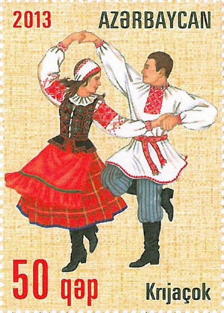 N 1090 - 50 qapik. There are pictured Belarusian folk dance "Krizhachok" on the stamp.